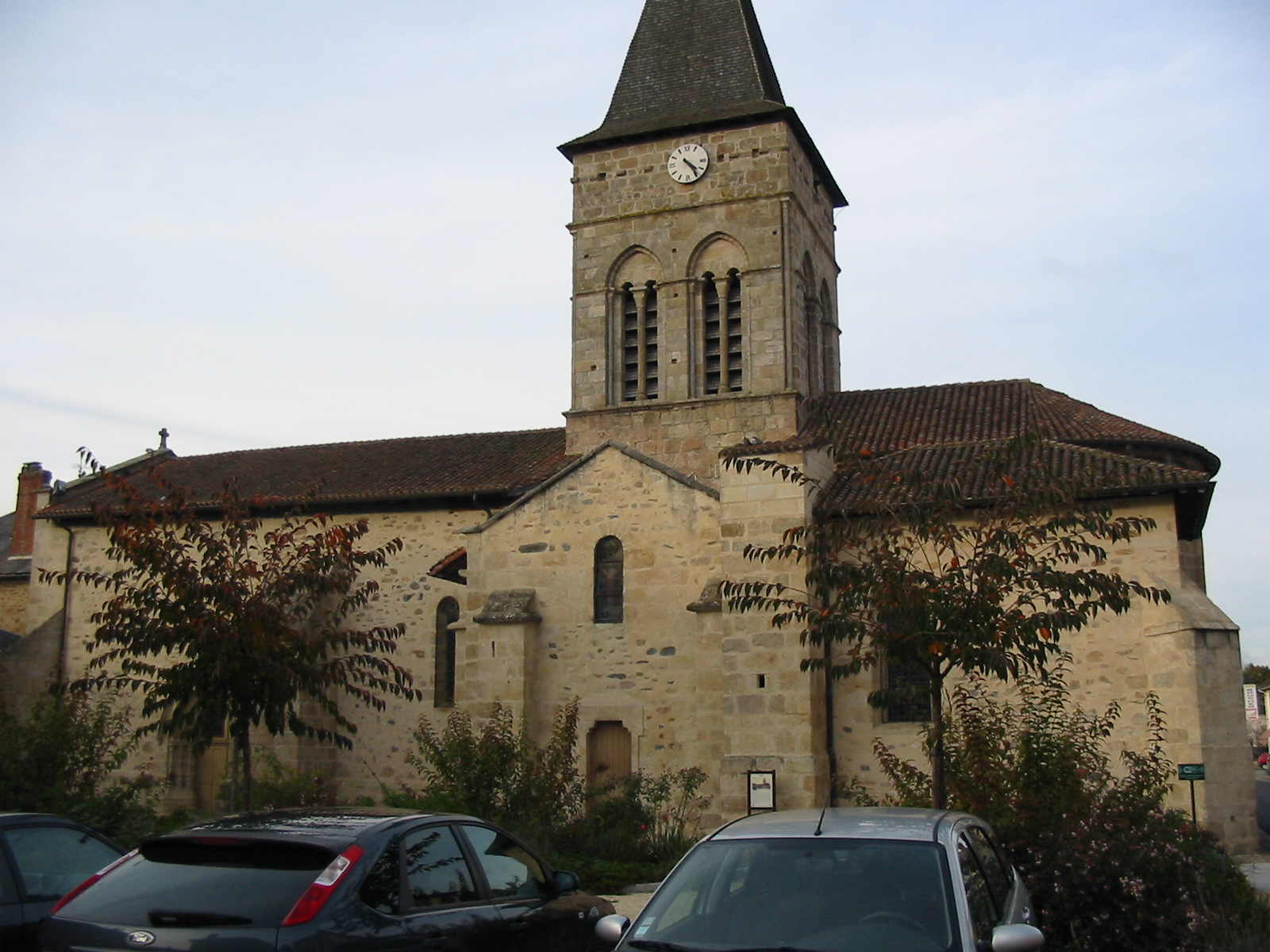 Église Saint-Laurent de Saint-Laurent-sur-Gorre (Haute-Vienne, France).